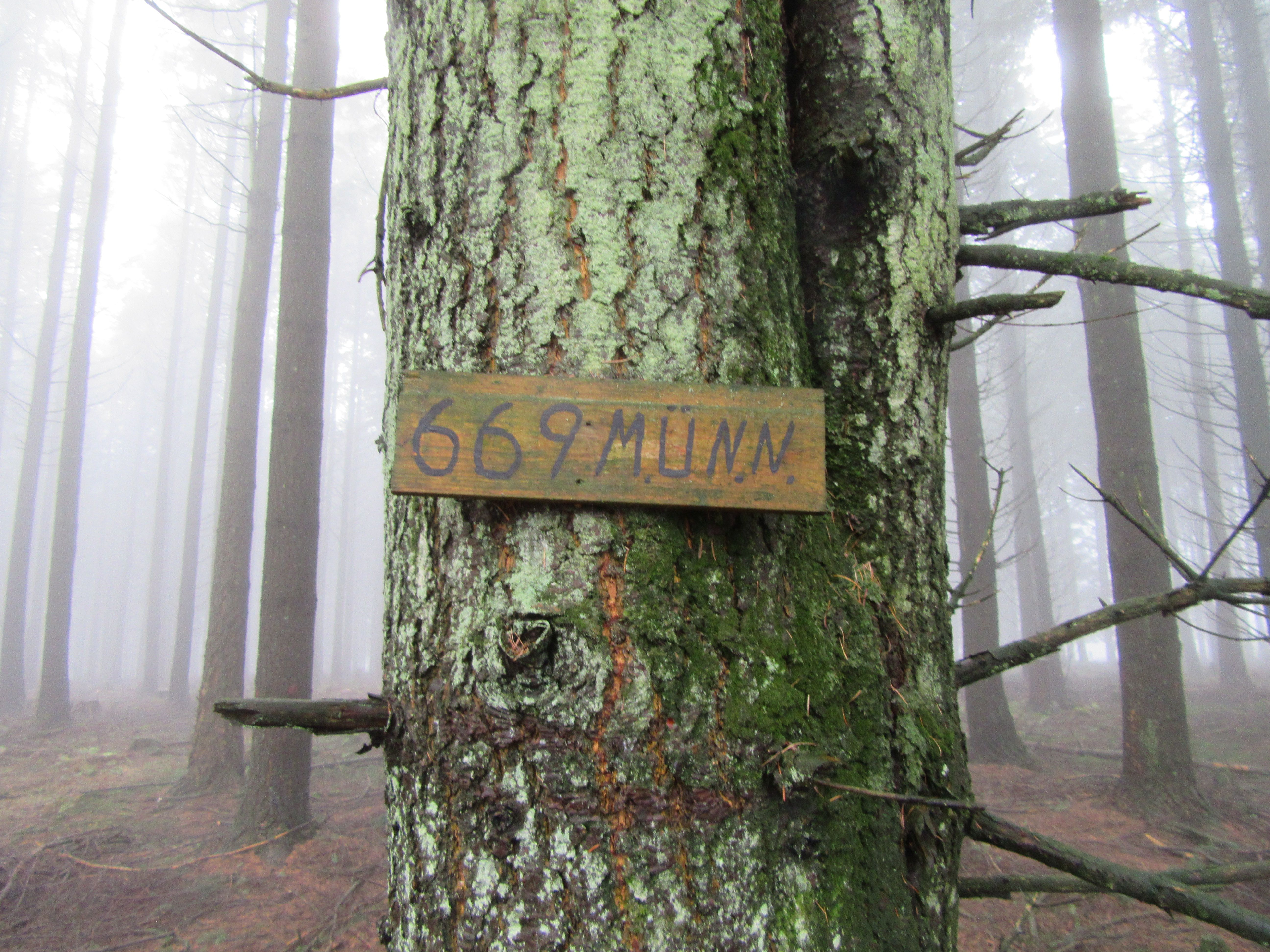 Hohe Wurzel (Beuren, Hochwald), Höhenangabe